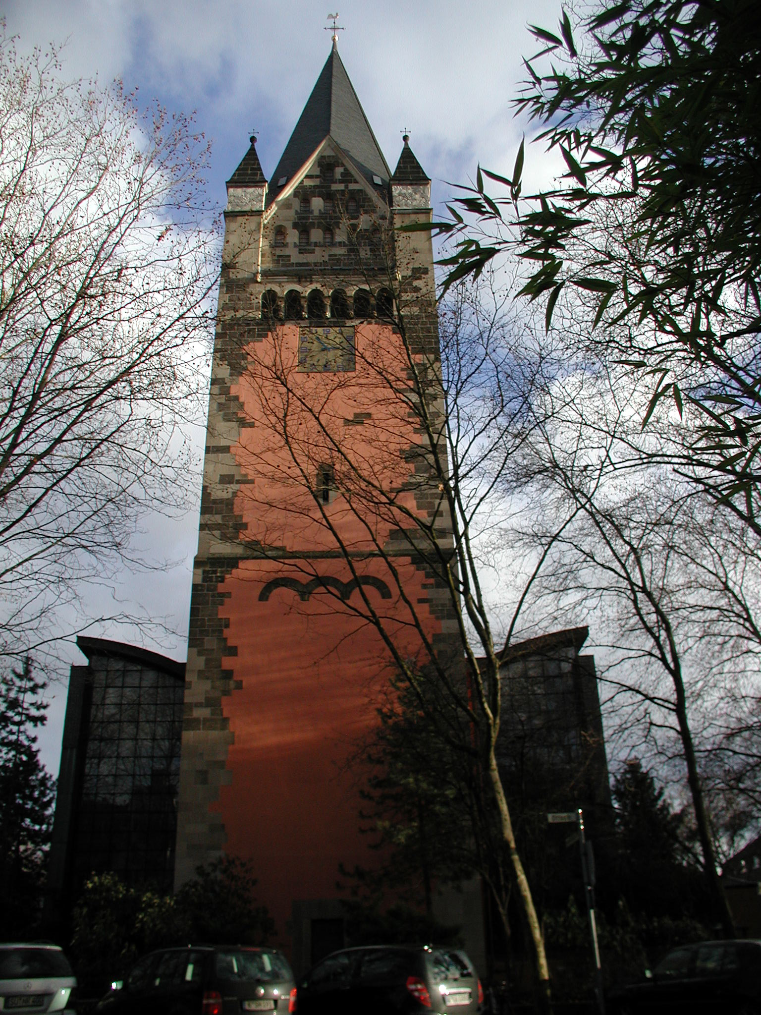 Köln Ehrenfeld, Anna Kirche